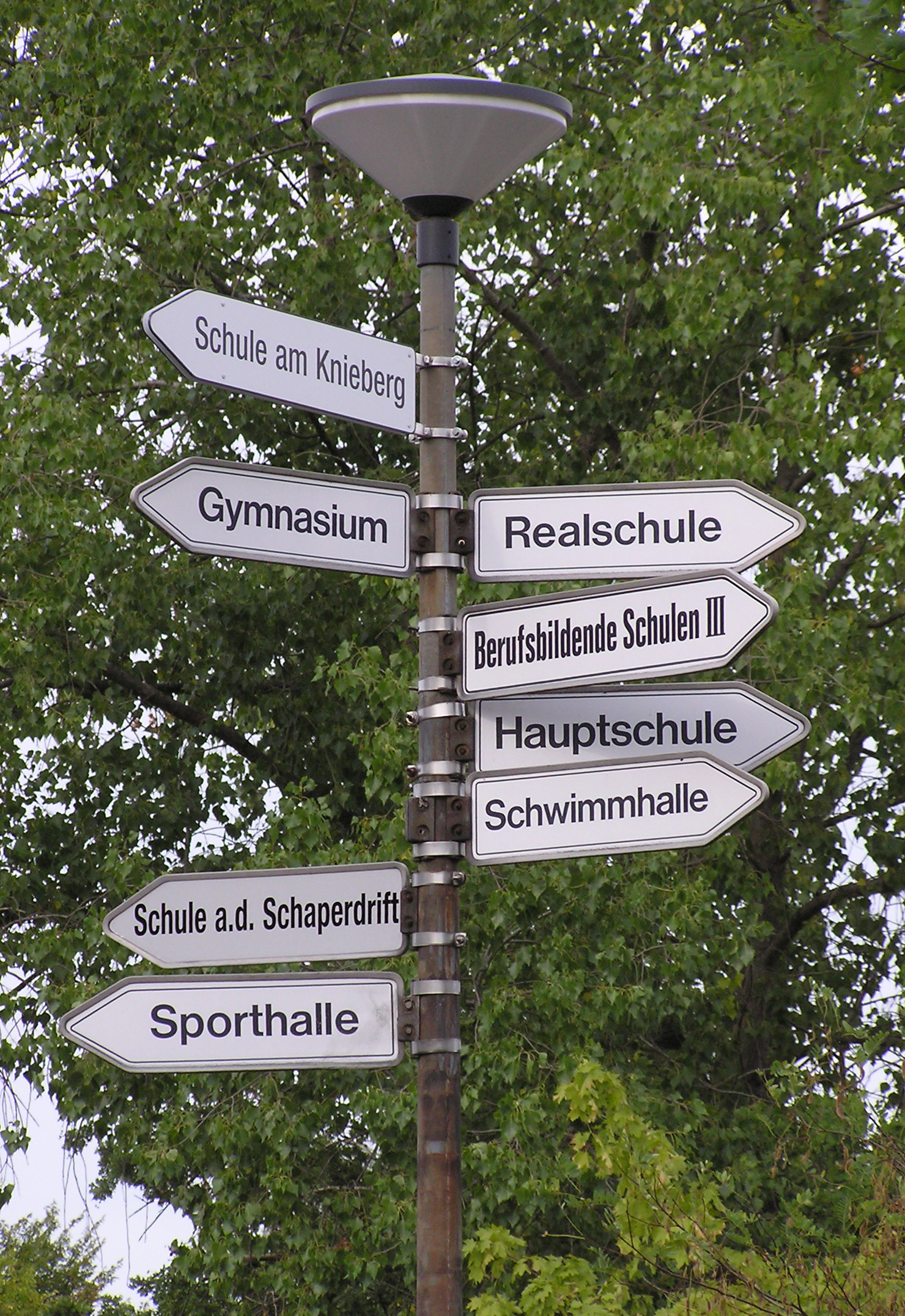 Schilder in Lüneburg